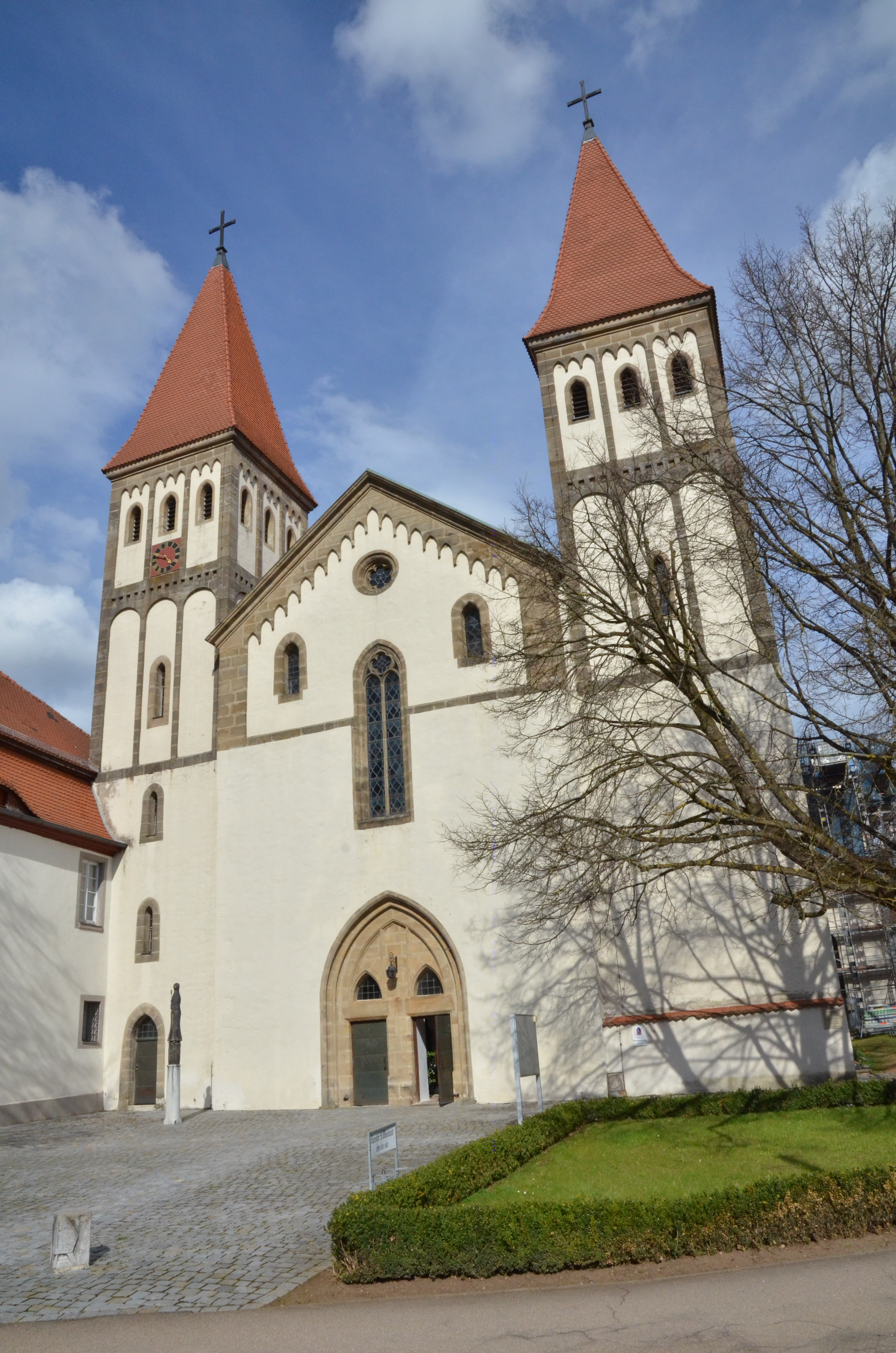 Kloster Heidenheim, Portal des Münsters